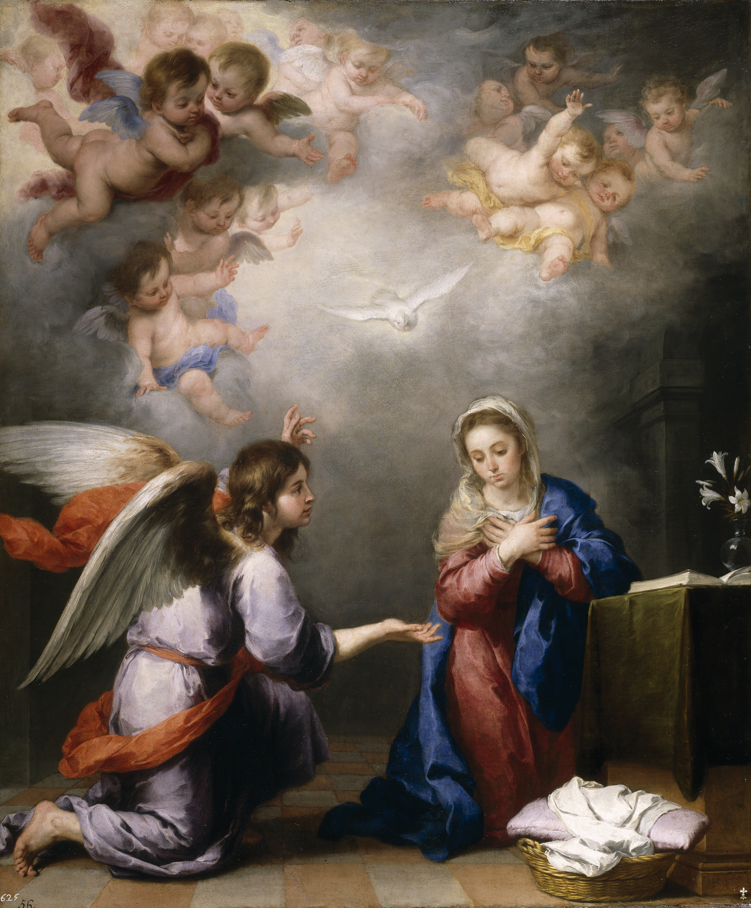 La obra representa el momento en que el Arcángel San Gabriel anunció a la Virgen María que sería la madre de Jesucristo, el Mesías.